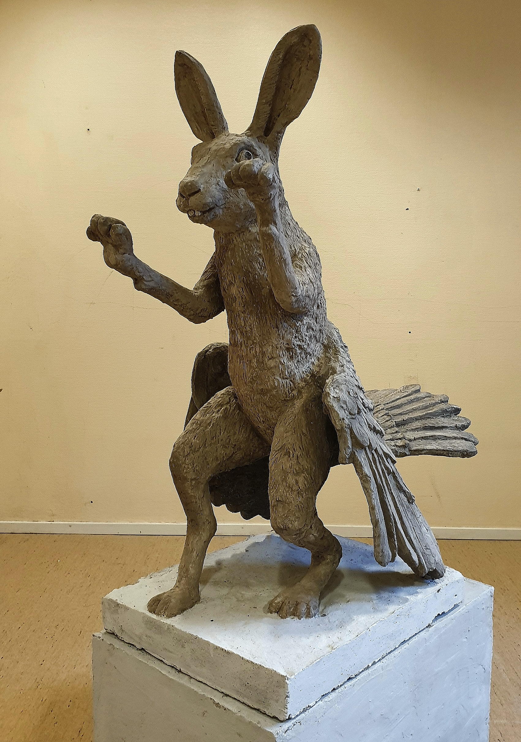 Skvadern gjuten i betong av Eskilstuna skulptören Stanislaw Lux